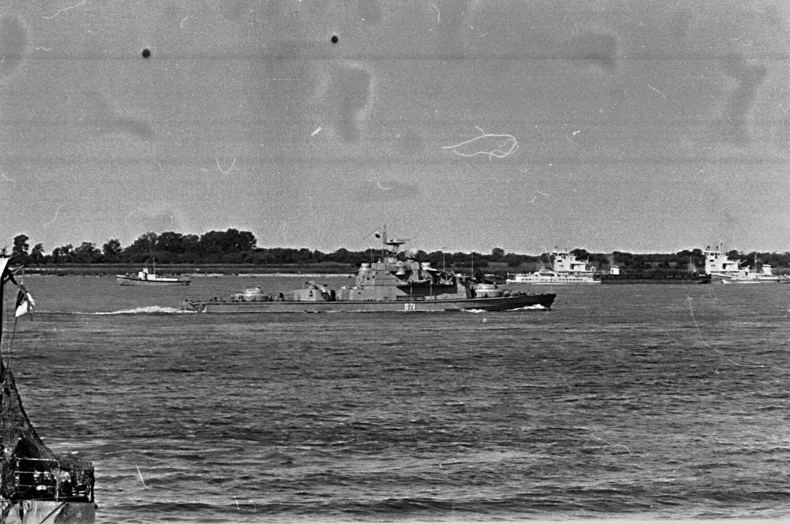 Хабаровск День ВМФ 1986 год